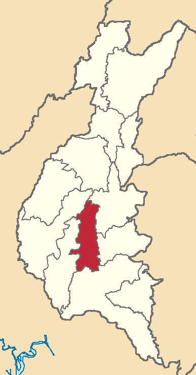 Mapa localizador del cantón en Los Ríos, Ecuador